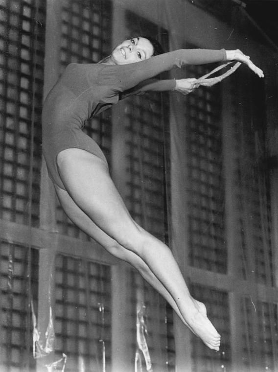 Ute Lehmann Zentralbild Studré 28.4.1968 Leipzig: Überprüfungswettkampf in der Künstlerischen Gymnastik. Siegerin des ersten Überprüfungswettkampfes dieses Jahres in der Künsterlischen Gymnastik wurde am 28.4.1968 in Leipzig die Vizeweltmeisterin Ute Lehmann (HSG DHfK Leipzig-Archivfoto) mit 28,60 Punkten.